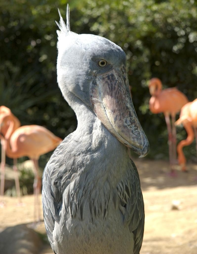 at Ueno zoo. Tokyo